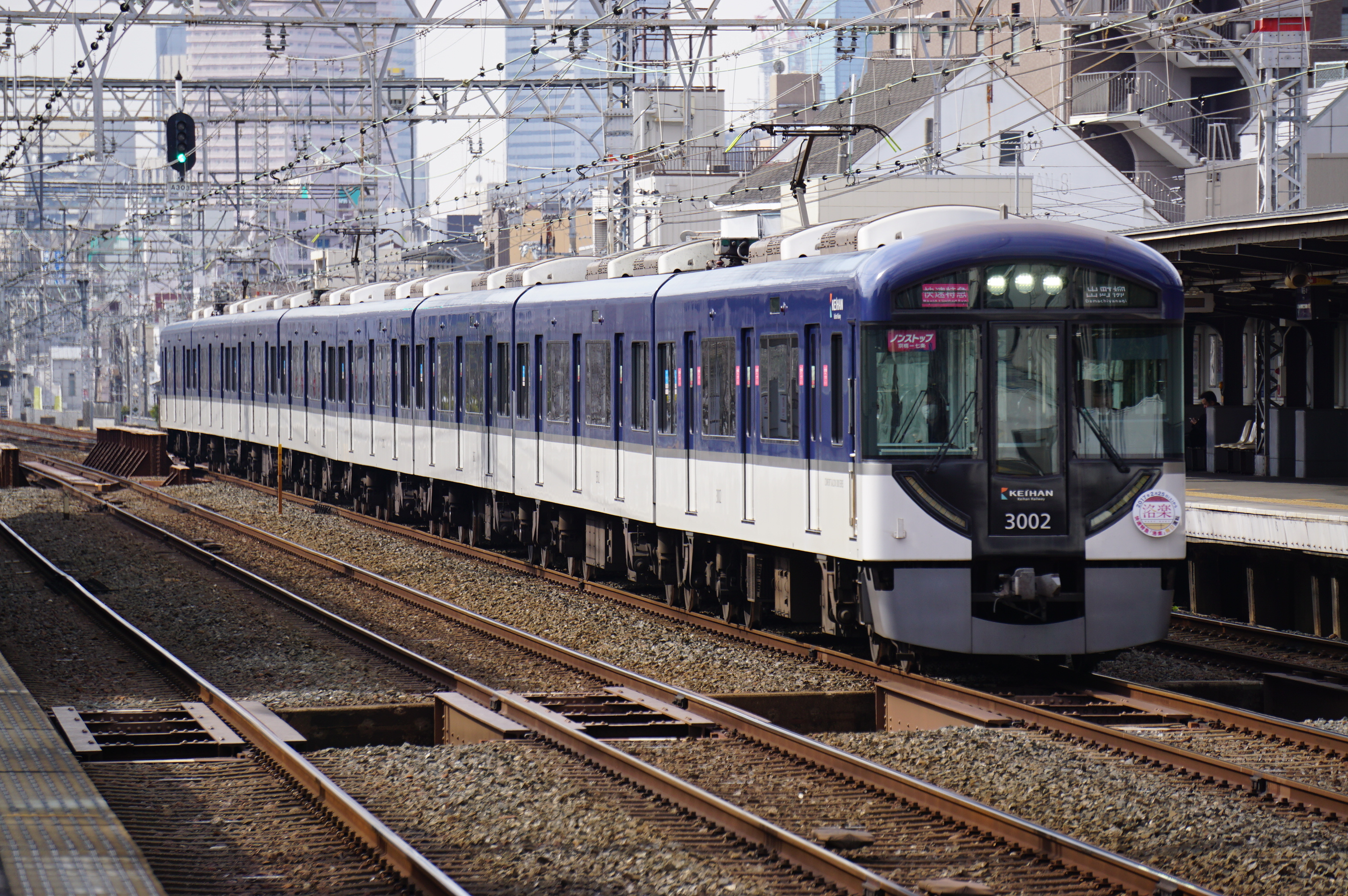 2017年2月25日改正以降3000系で運用されるようになった「洛楽」